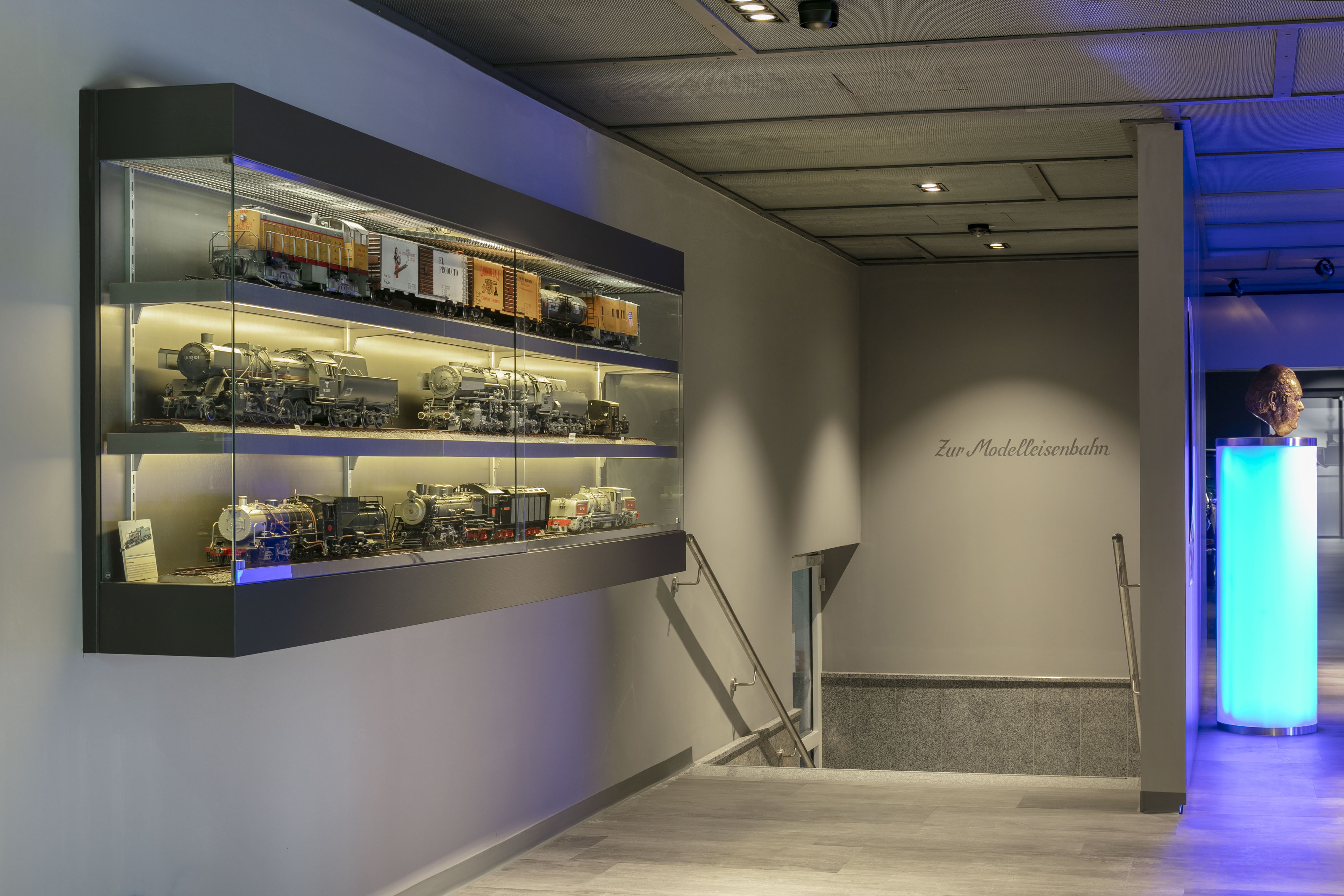 Treppe zur Modelleisenbahn im EFA Mobile Zeiten Museum in Amerang im Chiemgau.